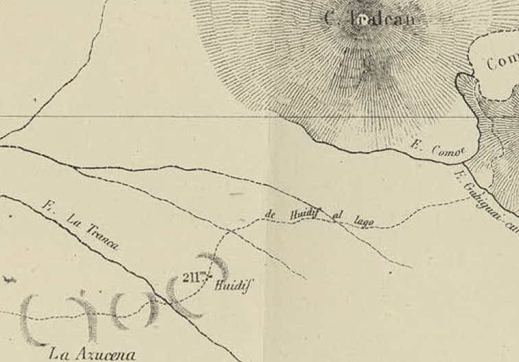 De Hudif al Lago Riñihue en el Mapa de la Expedicion de Francisco Vidal Gormaz 1869